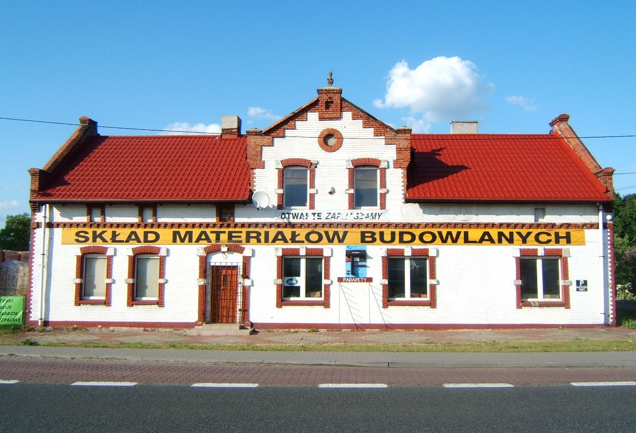 Dwana karczma "Nowa Wygoda" w Borowej Wsi